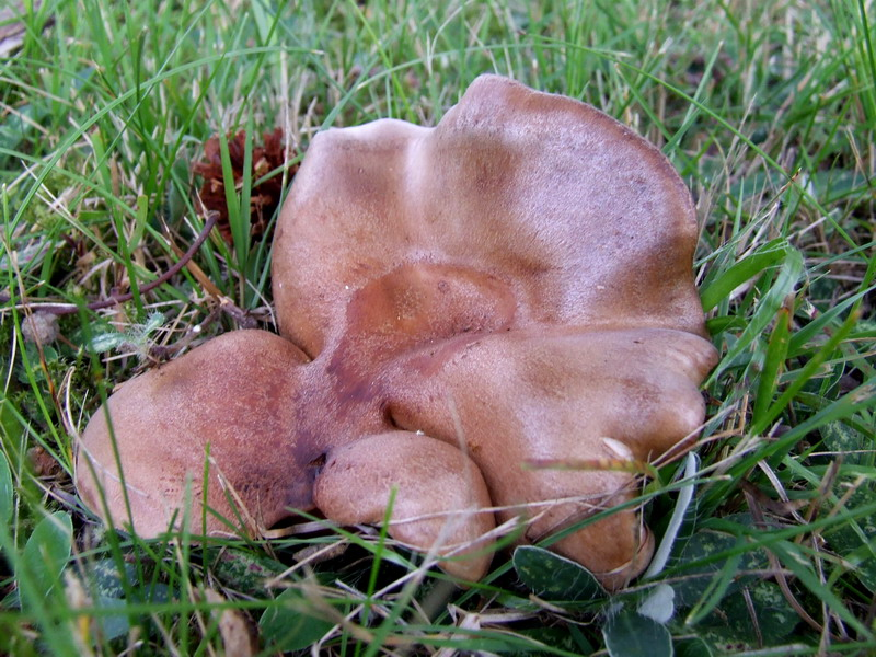 Lactarius quietus. Veseluvka, Jonava district, Lithuania.